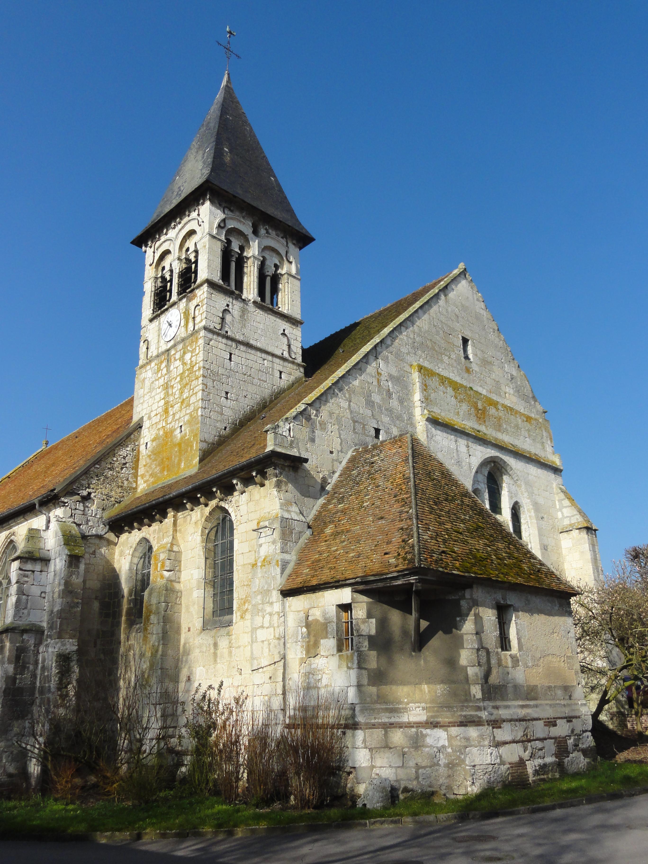 Église Notre-Dame de l'Annonciation d'Allonne - voir titre.